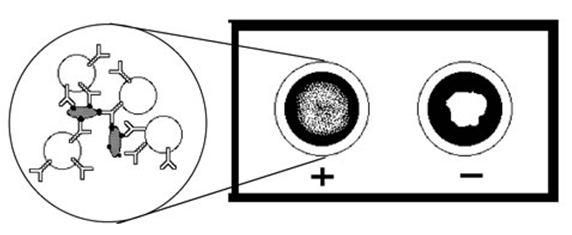 En la imatge podem veure la presentació macroscòpica d'un resultat positiu i negatiu en aglutinació.